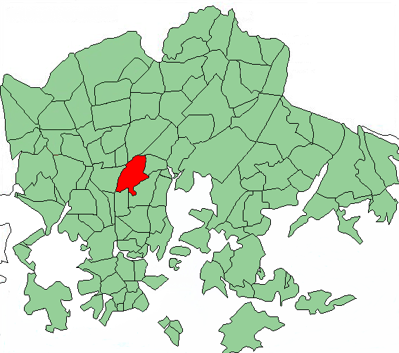 Map of Helsinki highlighting Käpylä